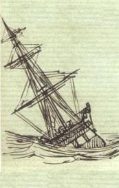 Dessin de la frégate Borda de Gustave Samanos en février 1878